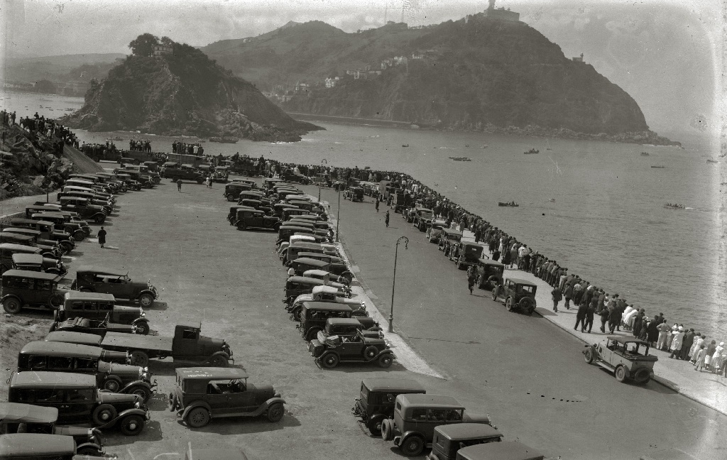 Título original: Celebración de las regatas de la Concha (10/12) Localización: San Sebastián (Guipúzcoa)